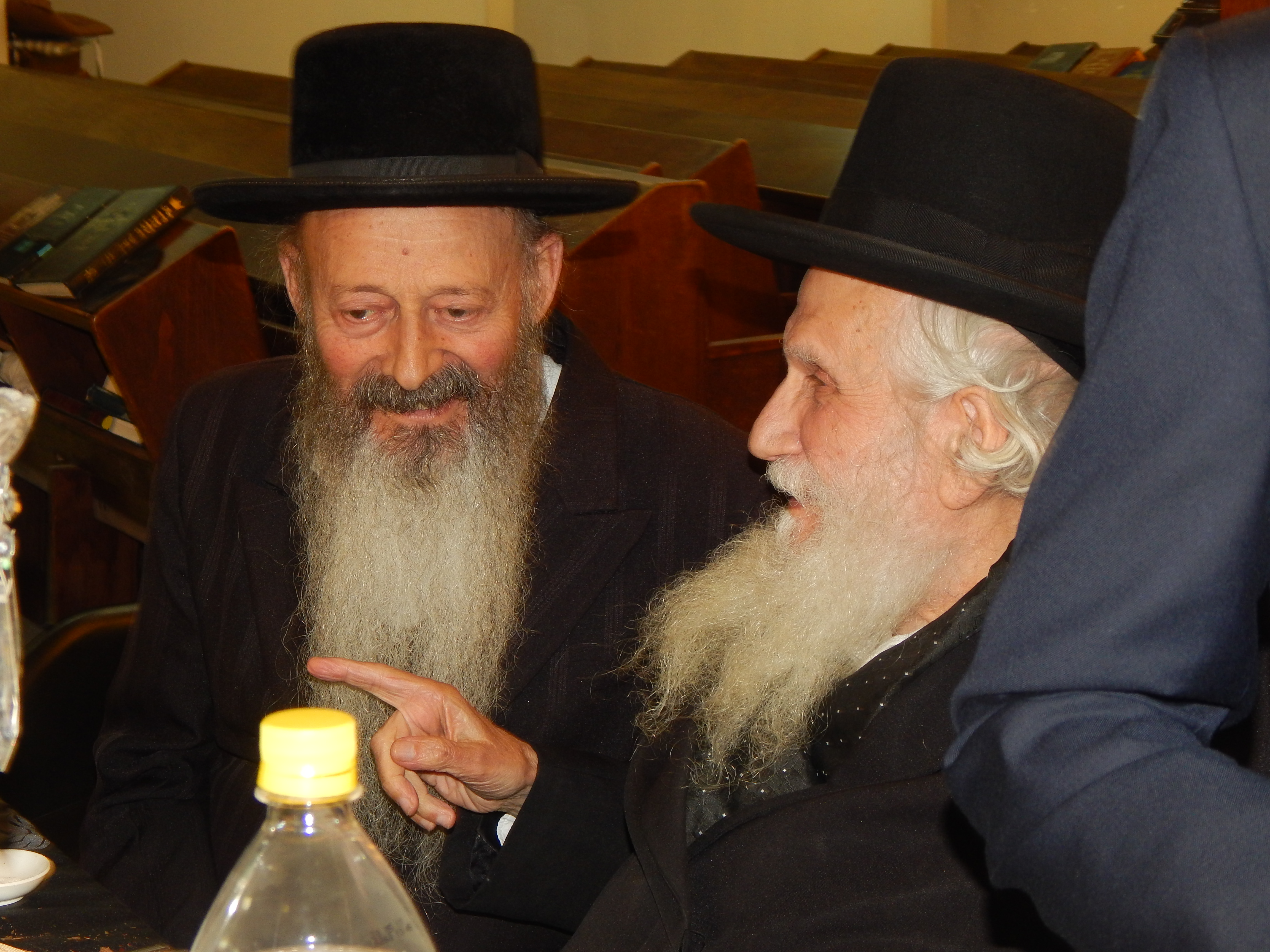 הר אוירבך עם אחד מבני קהילתו